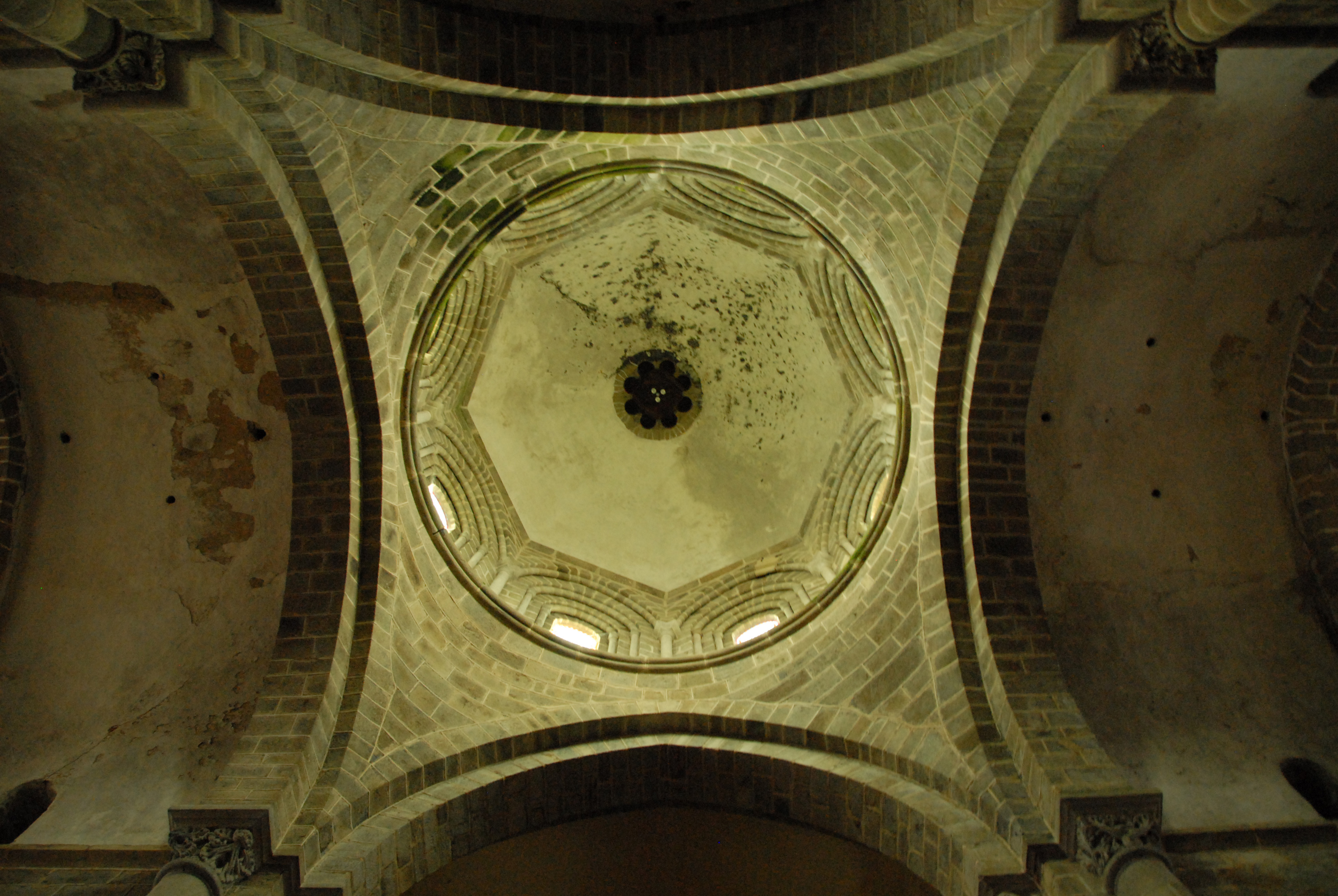 St-Pierre de Le Dorat, Pendentifkuppel über Vierung